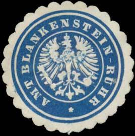 Sealing stamp Title: Amt Blankenstein-Ruhr Description: blau, weiß, geprägt Place: Blankenstein/Ruhr size: 3 cm